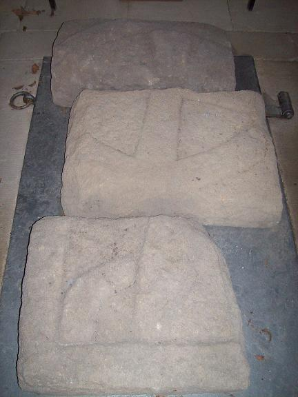 Romanische Grabplatte in Fördergersdorf